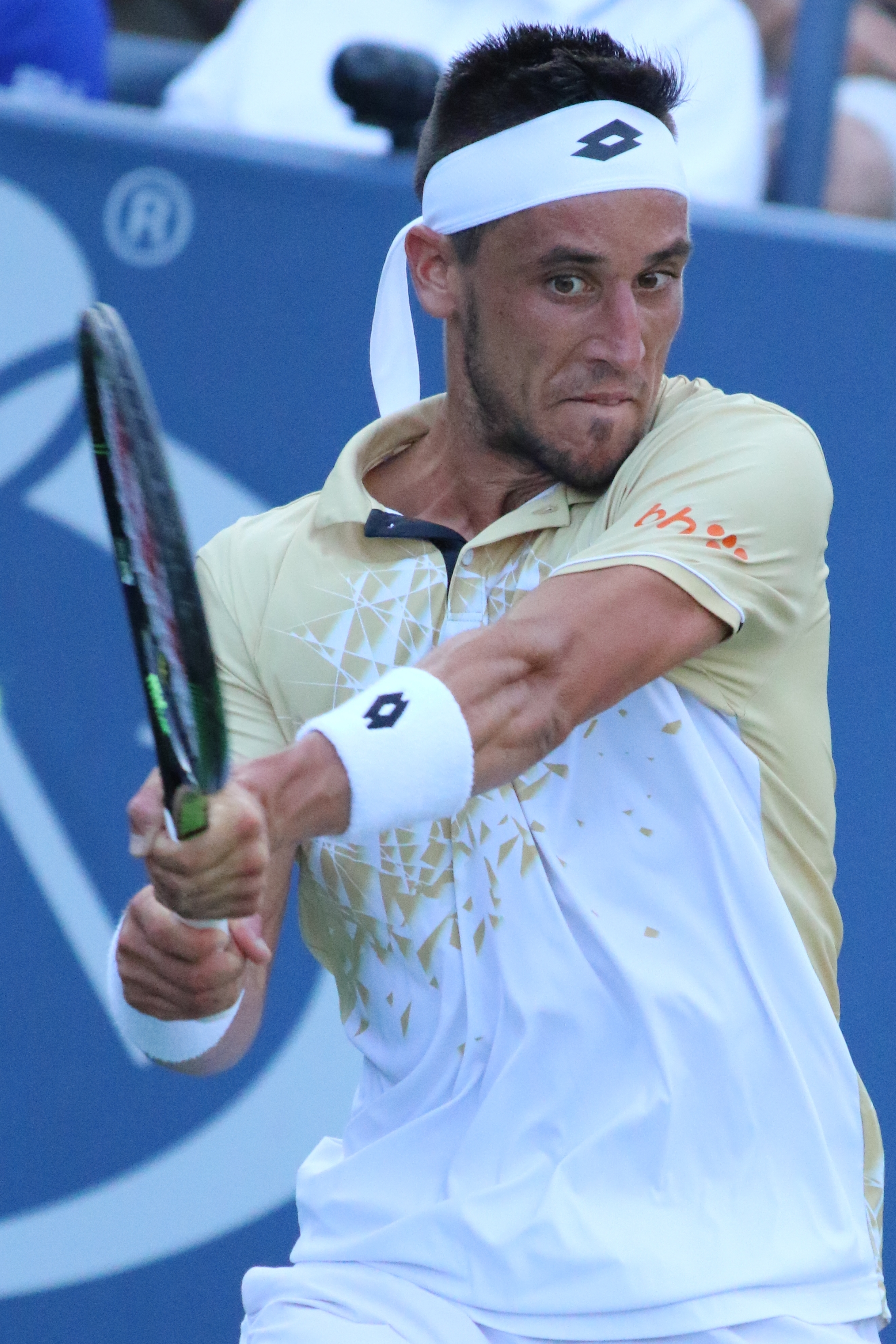 Dzumhur US16 (26)